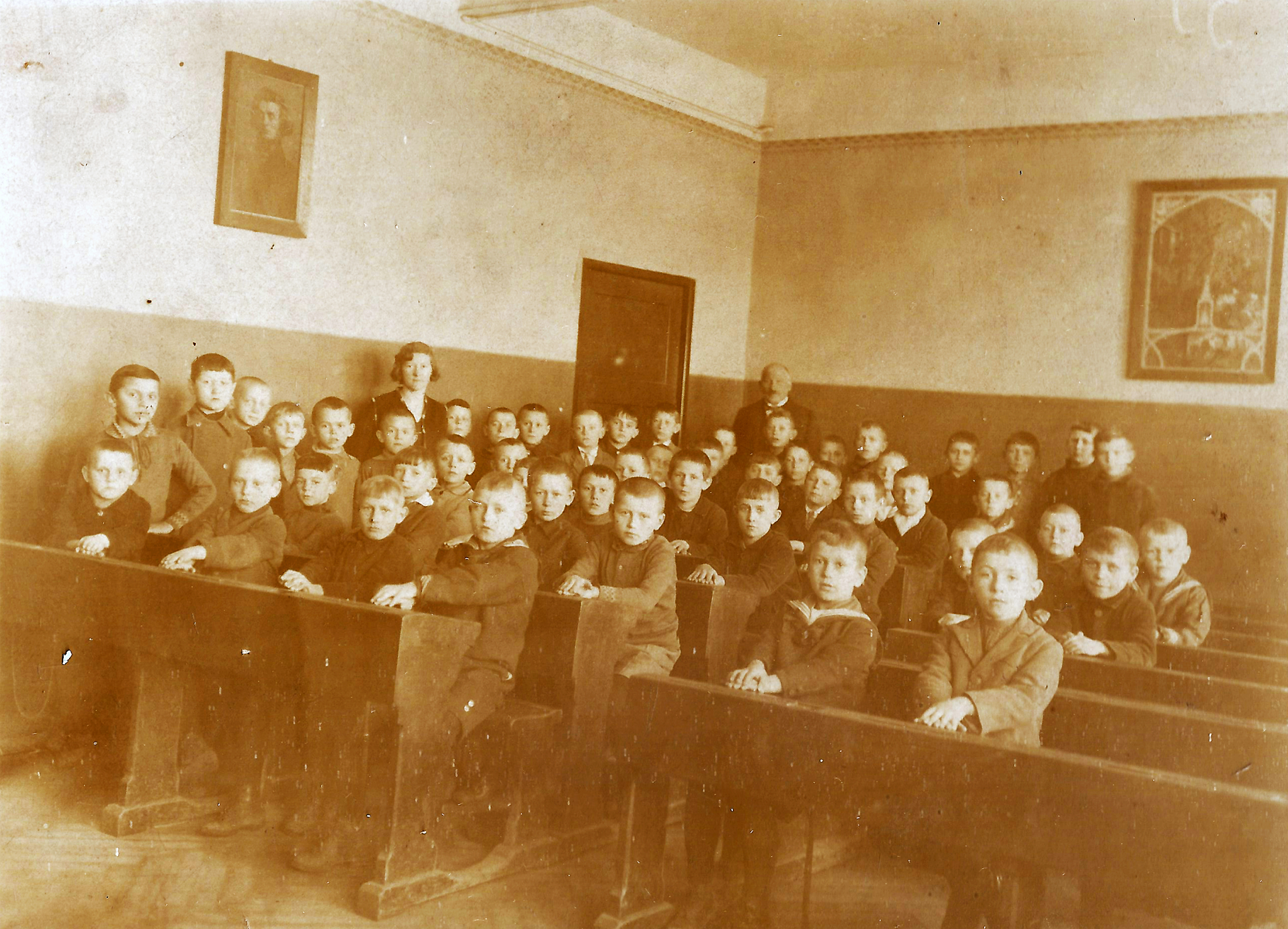 Skan zdjęcia z izby pamięci ze szkoły w Kokoszkowach, klasa dh Józefa Grzybka w Szkole Powszechnej w Starogardzie